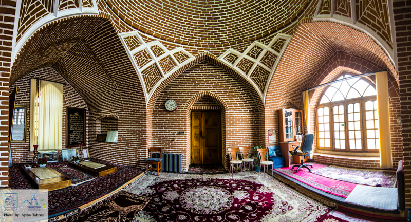 آرامگاه شیخ محمود شبستری